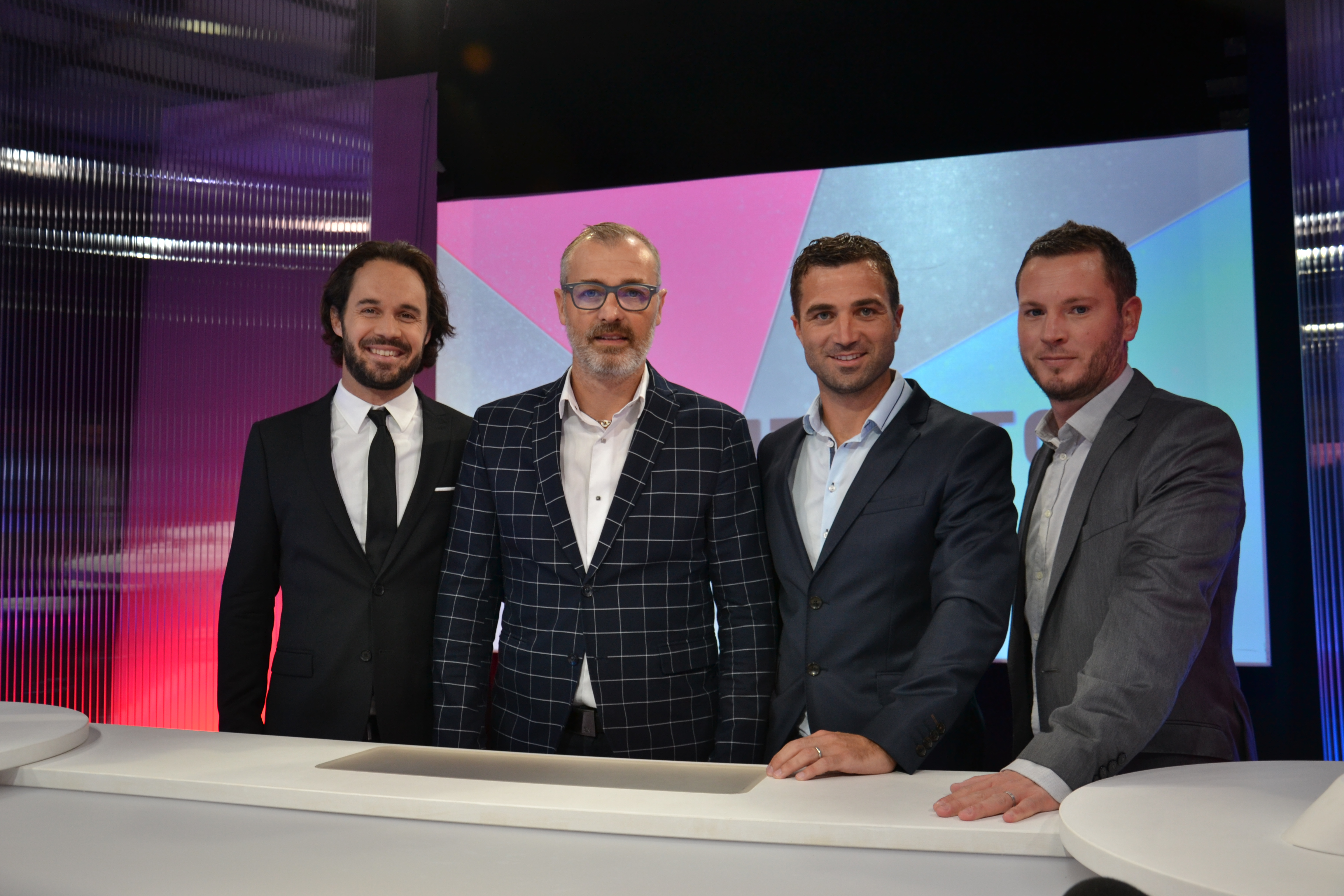 Basile Vannetzel, Arnaud Rivenet, Jérémy Berthod, Guillaume Gache